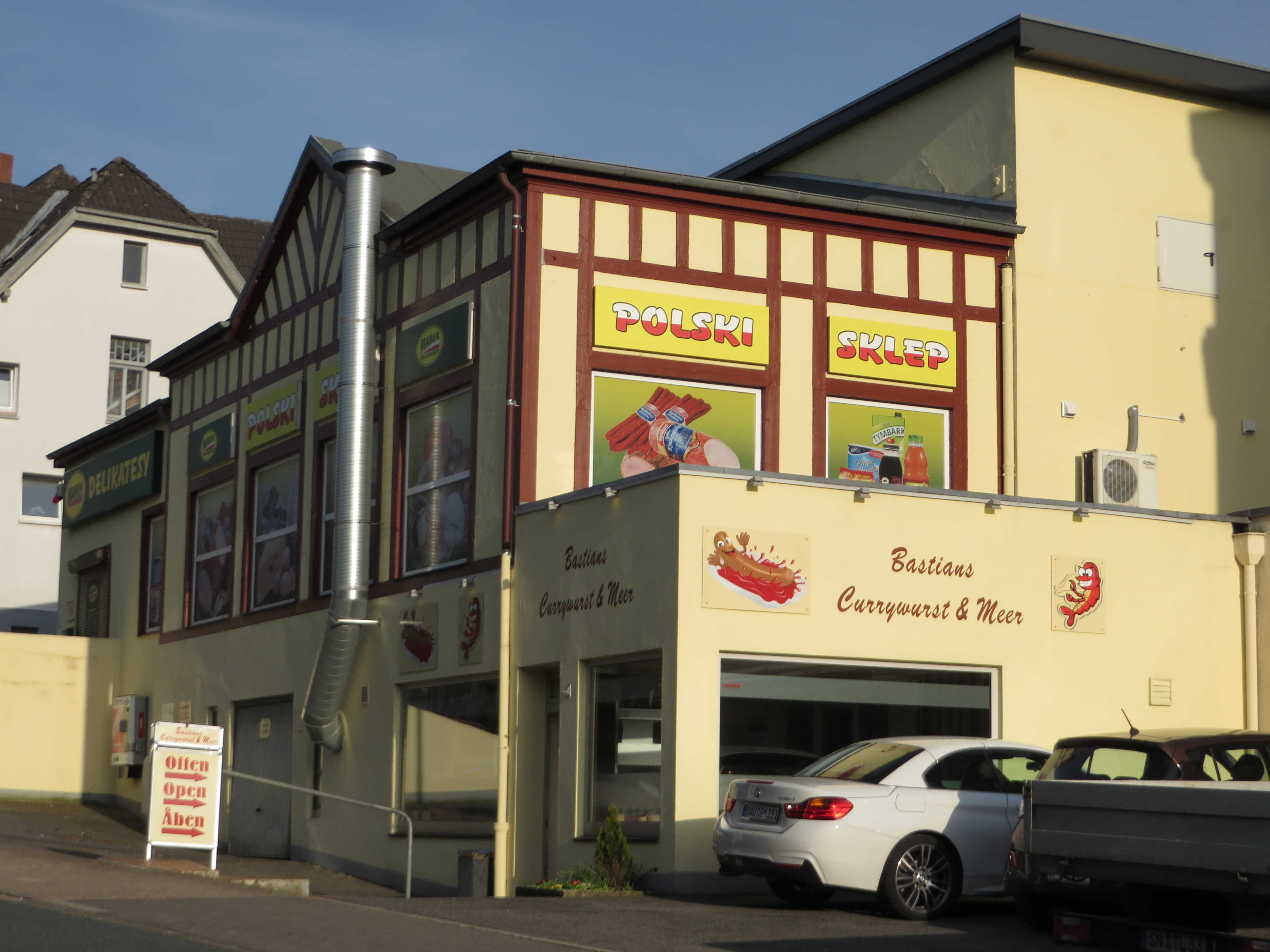 Ehemaliges Pali (Park-Lichtspiele) der Seewarte (Mürwik 2015)